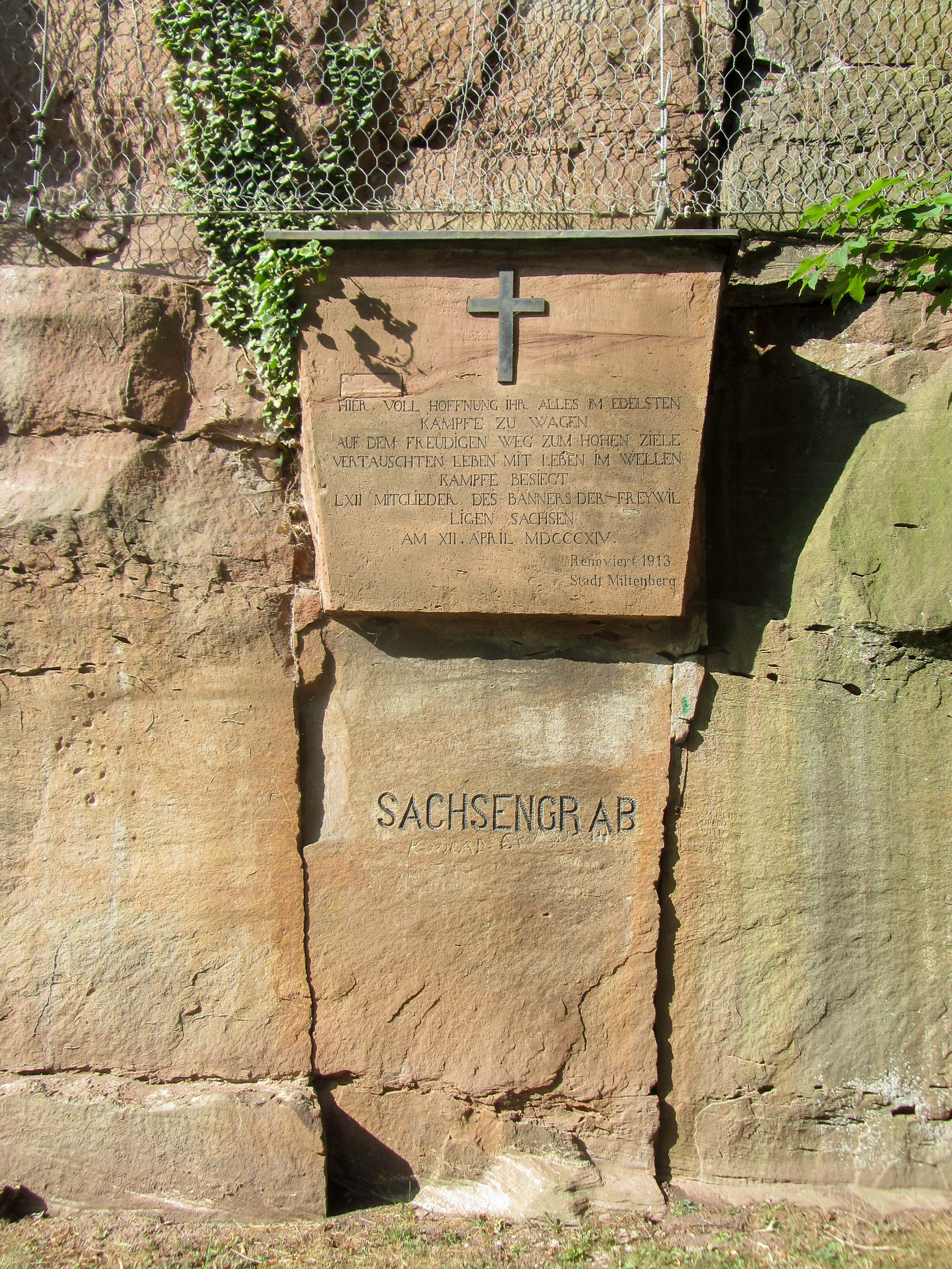 Sachsengrab in Miltenberg. Begräbnisplatz für insgesamt 65 sächsische Soldaten und Fährleute, die während der napoleonischen Befreiungskriege durch ein Fährunglück auf dem Main ums Leben kamen